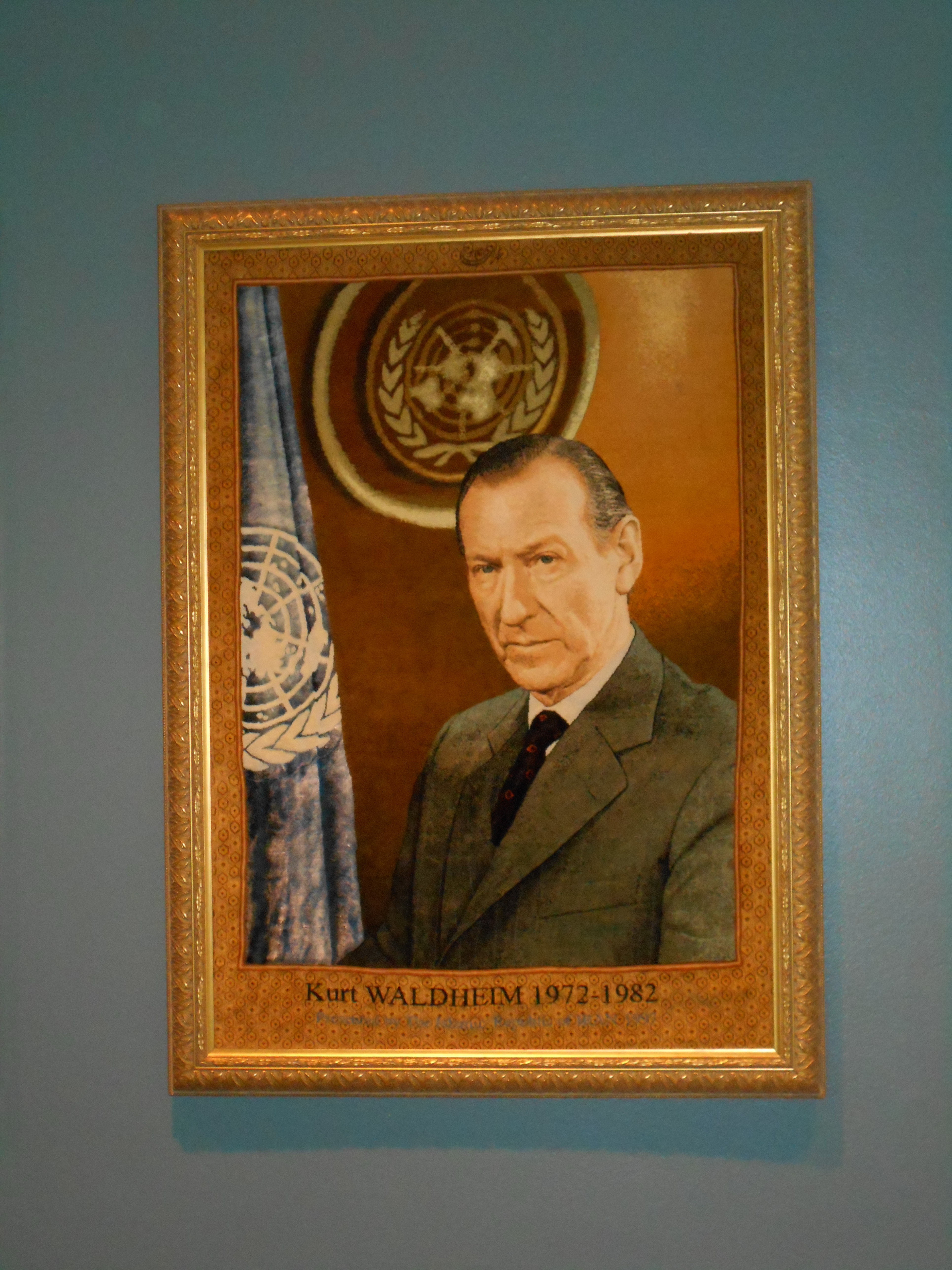 Kurt Waldheim. Teppich, Geschenk der Islamischen Republik Iran an die UNO, New York City